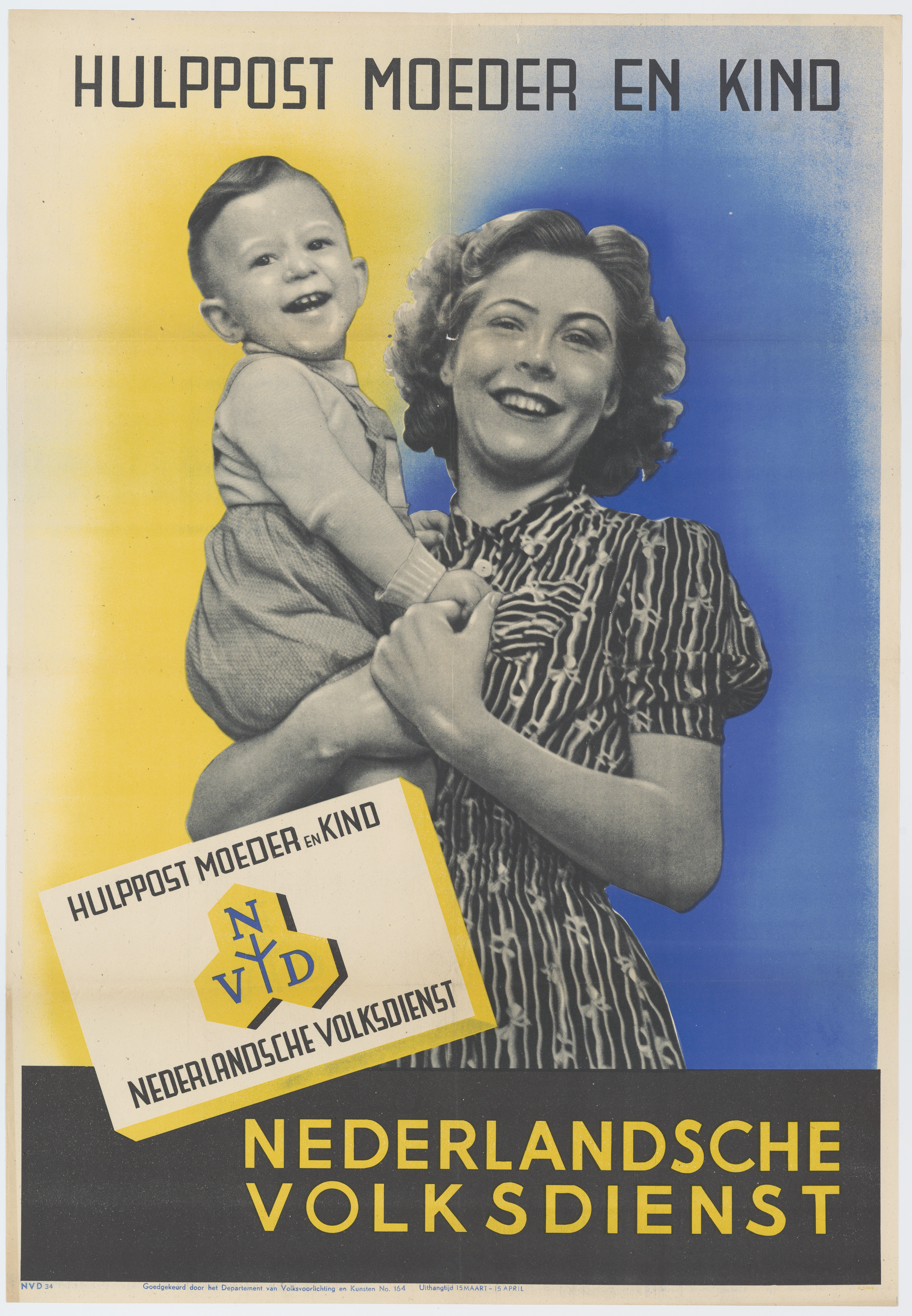 Affiche voor 'Hulppost moeder en kind' van de Nederlandsche Volksdienst. Uithangtermijn van 15 maart tot 15 april 1943.